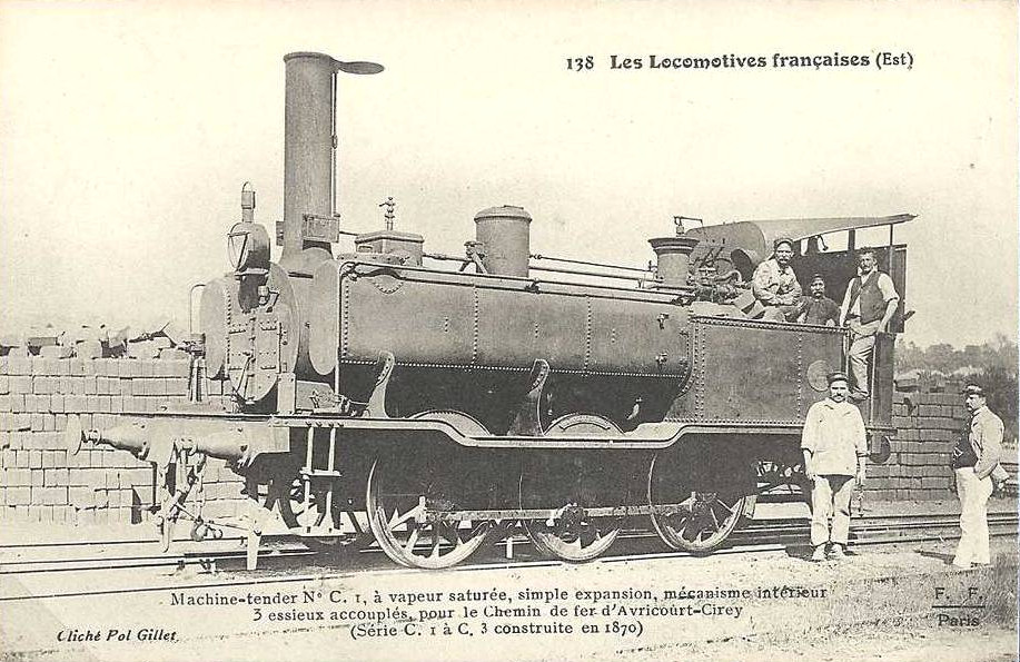 locomotive 1870